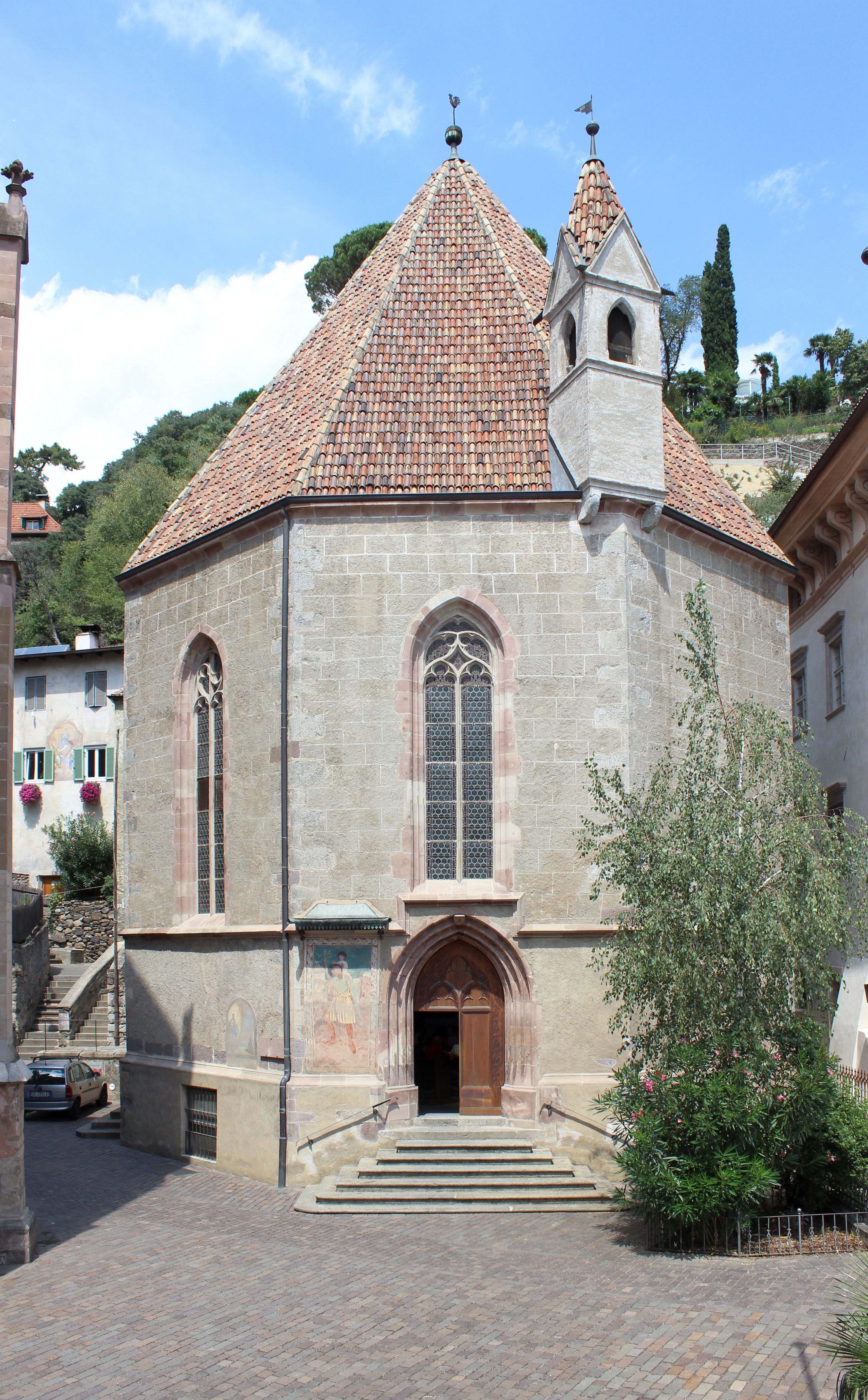 St. Barbara in Meran